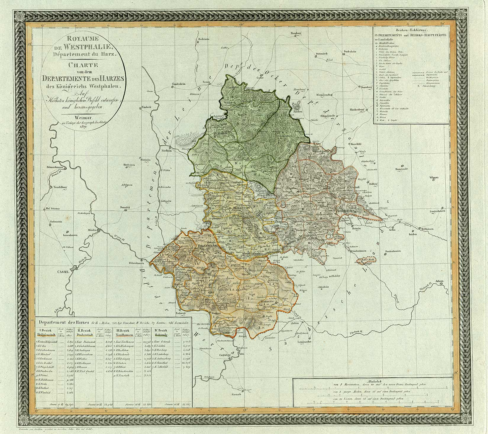 Charte von dem Departement des Harzes des Königreichs Westphalen